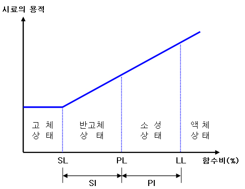 아터버그 한계 설명